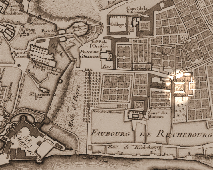 Lumière sur le couvent des Ursulines de Nantes. "Plan de la Ville de Nantes et de ses Faubourgs, levé par ordre de MM les Maire, Echevins et Procureurs du Roy sindic de la dite Ville, par le S. François Cacault en 1756 et en 1757"